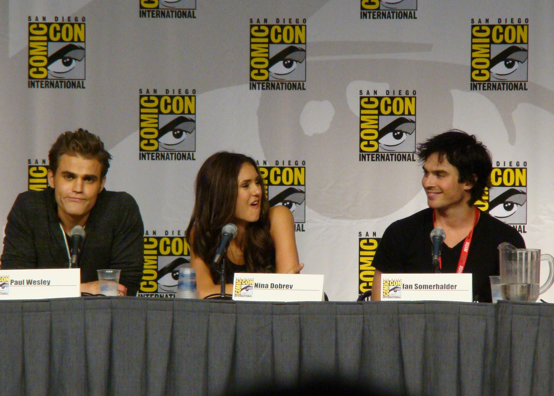 Paul Wesley, Nina Dobrev & Ian Somerhalder